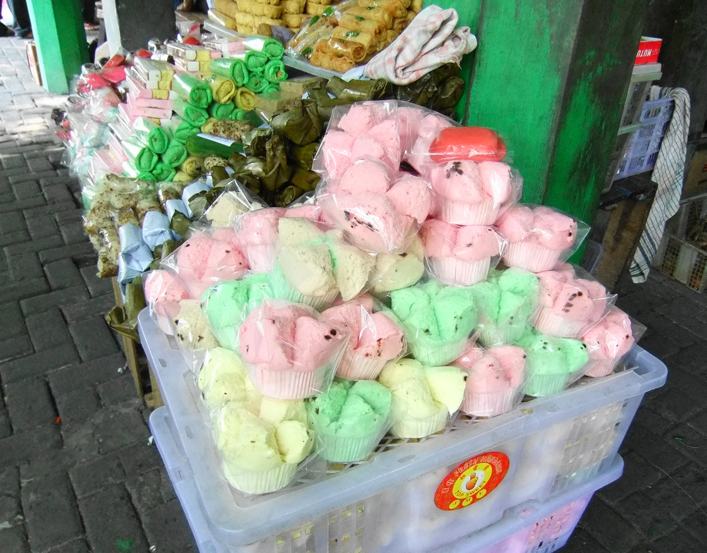 Kue bolu kukus, Pasar Bulu Semarang